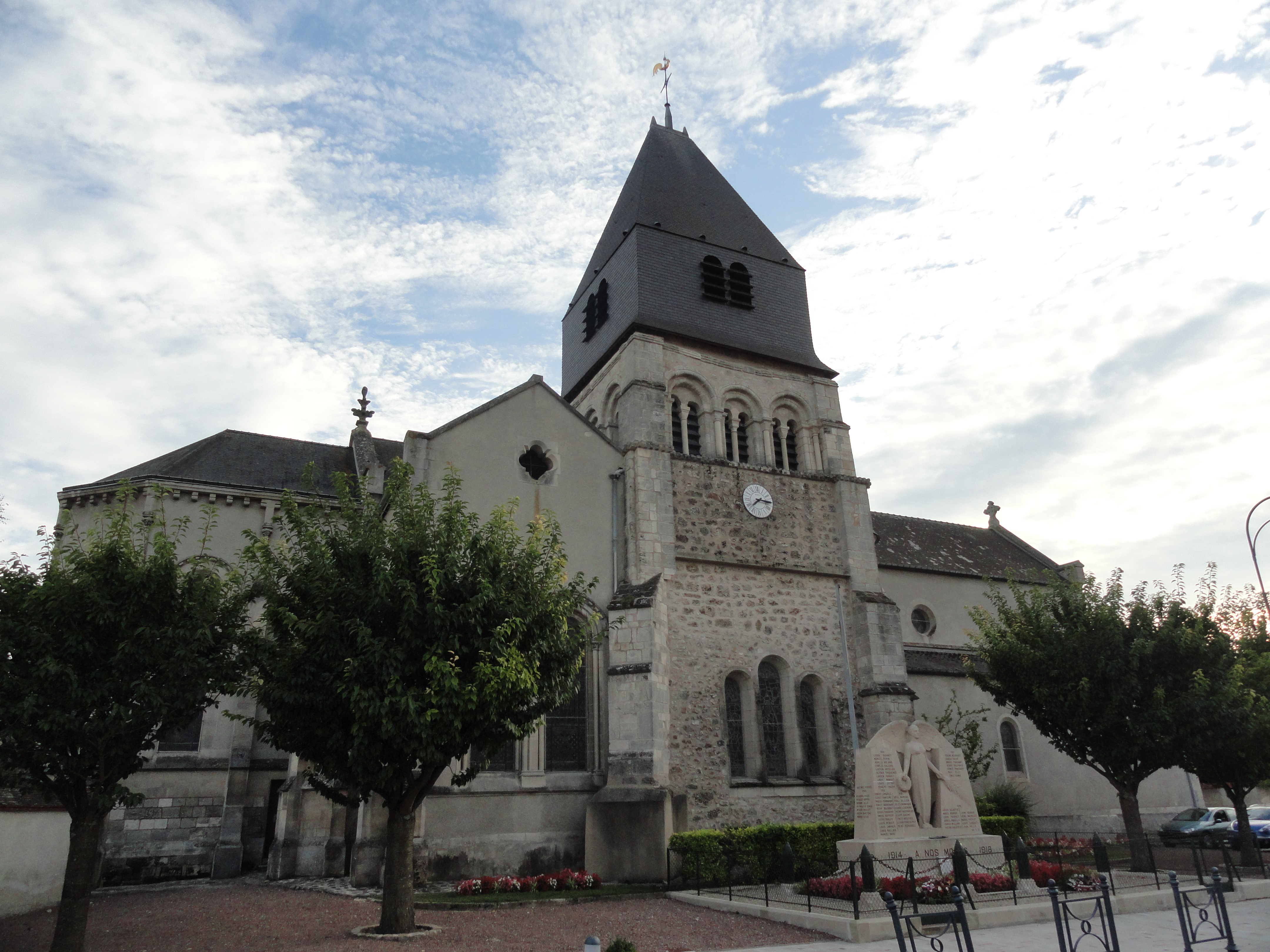 Côté nord de l'église Saint-Hilaire de Mareuil-sur-Ay (Marne), dont le clocher est classé monument historique.